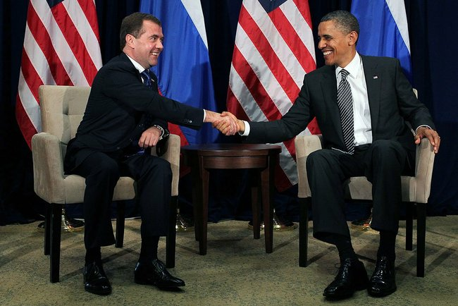 По итогам переговоров Дмитрий Медведев и Президент США Барак Обама сделали заявления для прессы.